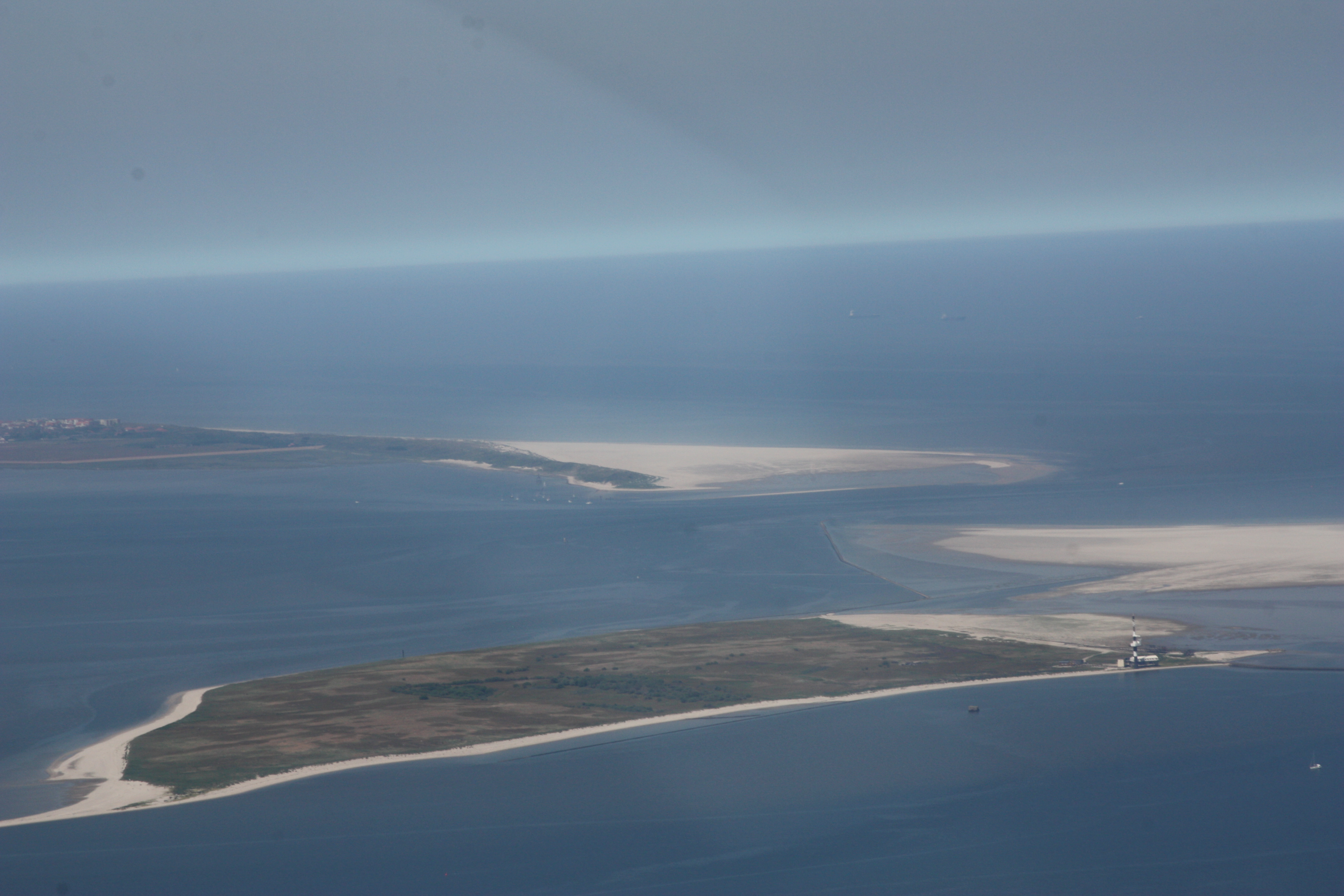 Flug über Minsener Oog - von Wangerooge kommend, weiter nach Wangerland und Wilhemshaven; Flughöhe 500 m = 1500 ft; Juli 2010